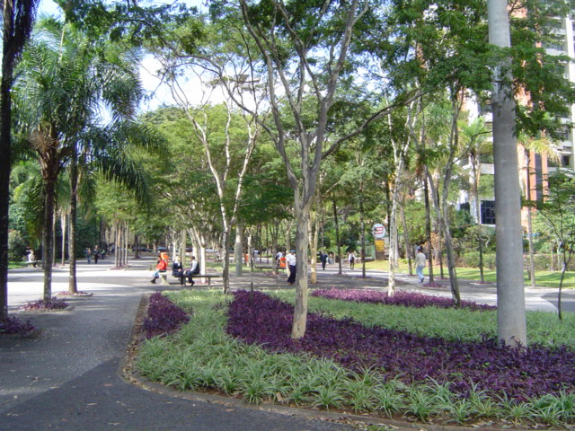 Alameda arborizada no bairro de Alphaville, Barueri SP.